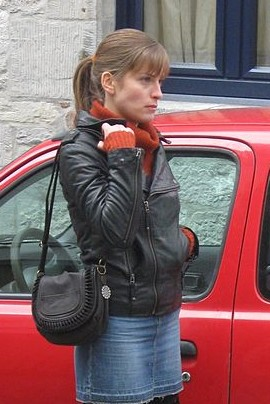 Julie Bernard lors du tournage d'une scène du film Rien à déclarer de et avec Dany Boon